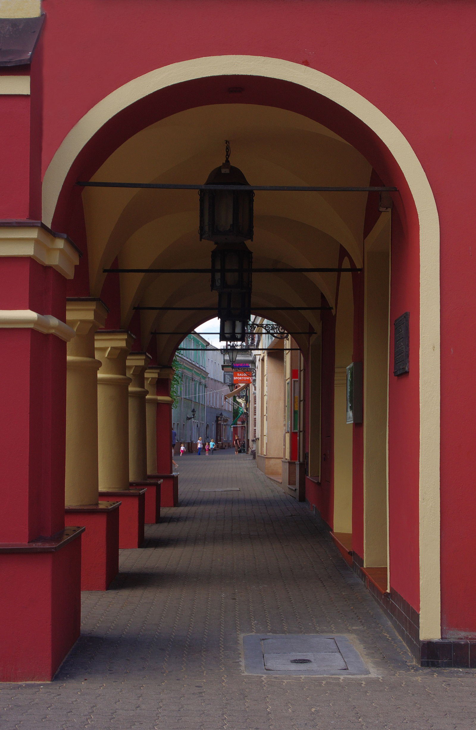 Leszno, Rynek 29 - dom z XVII w. (zabytek nr 188/2/A)